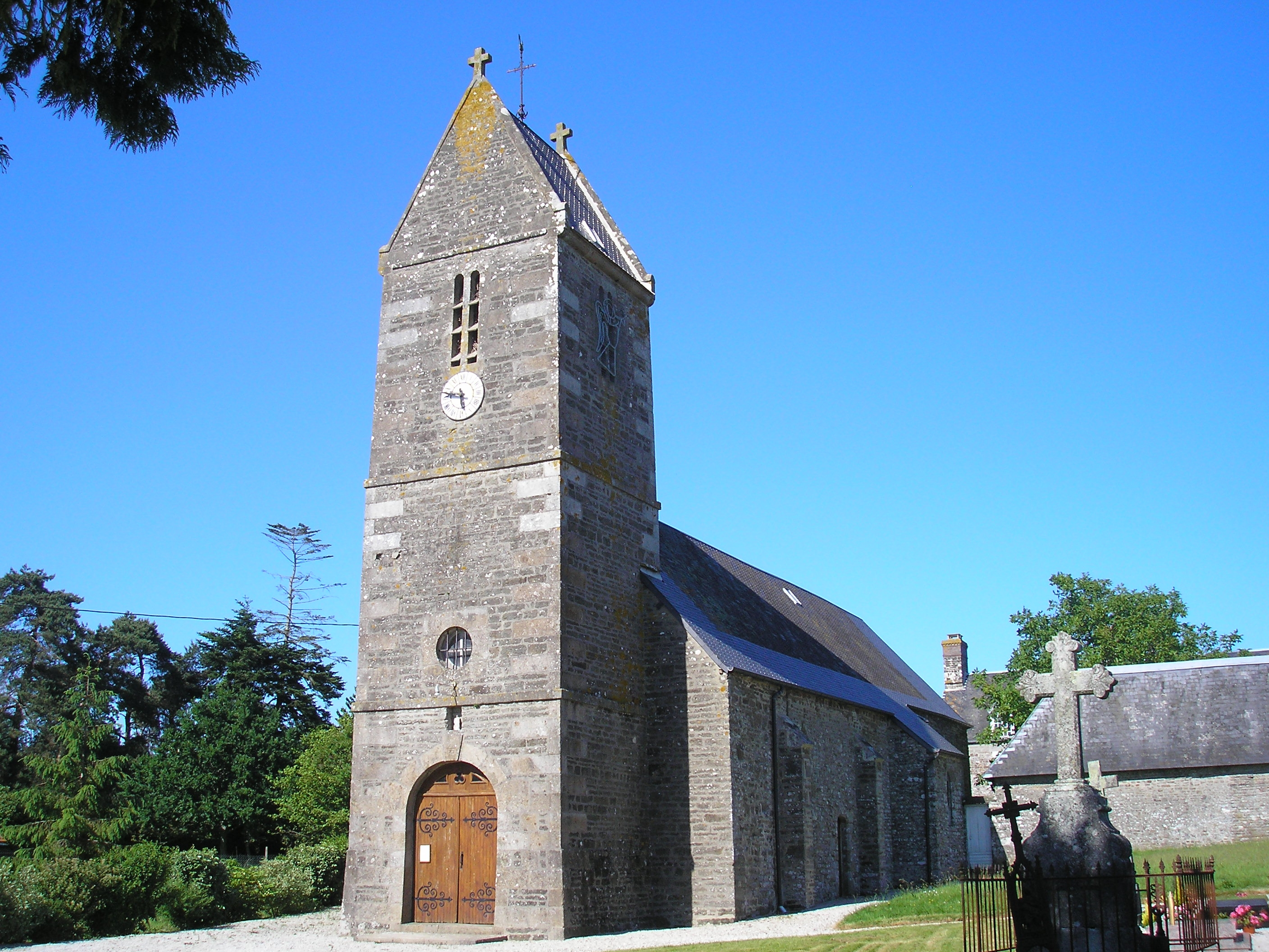 Beuvrigny (Normandie, France). L'église Saint-Martin.